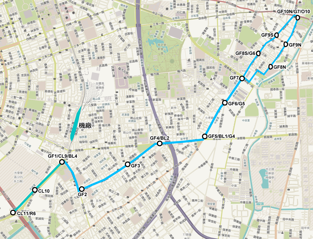 2003年 高雄縣 鳳山輕軌電車規劃中的建議路線